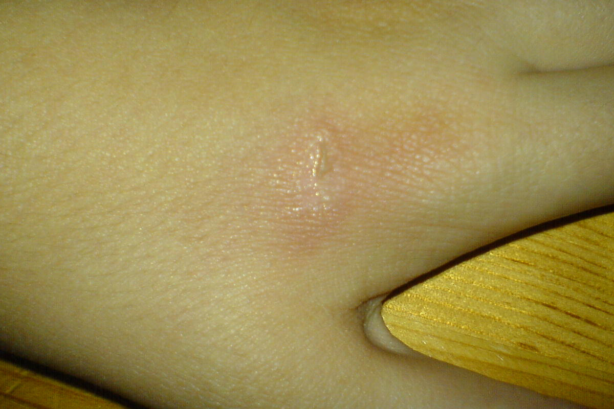 Verbrennung ersten Grades